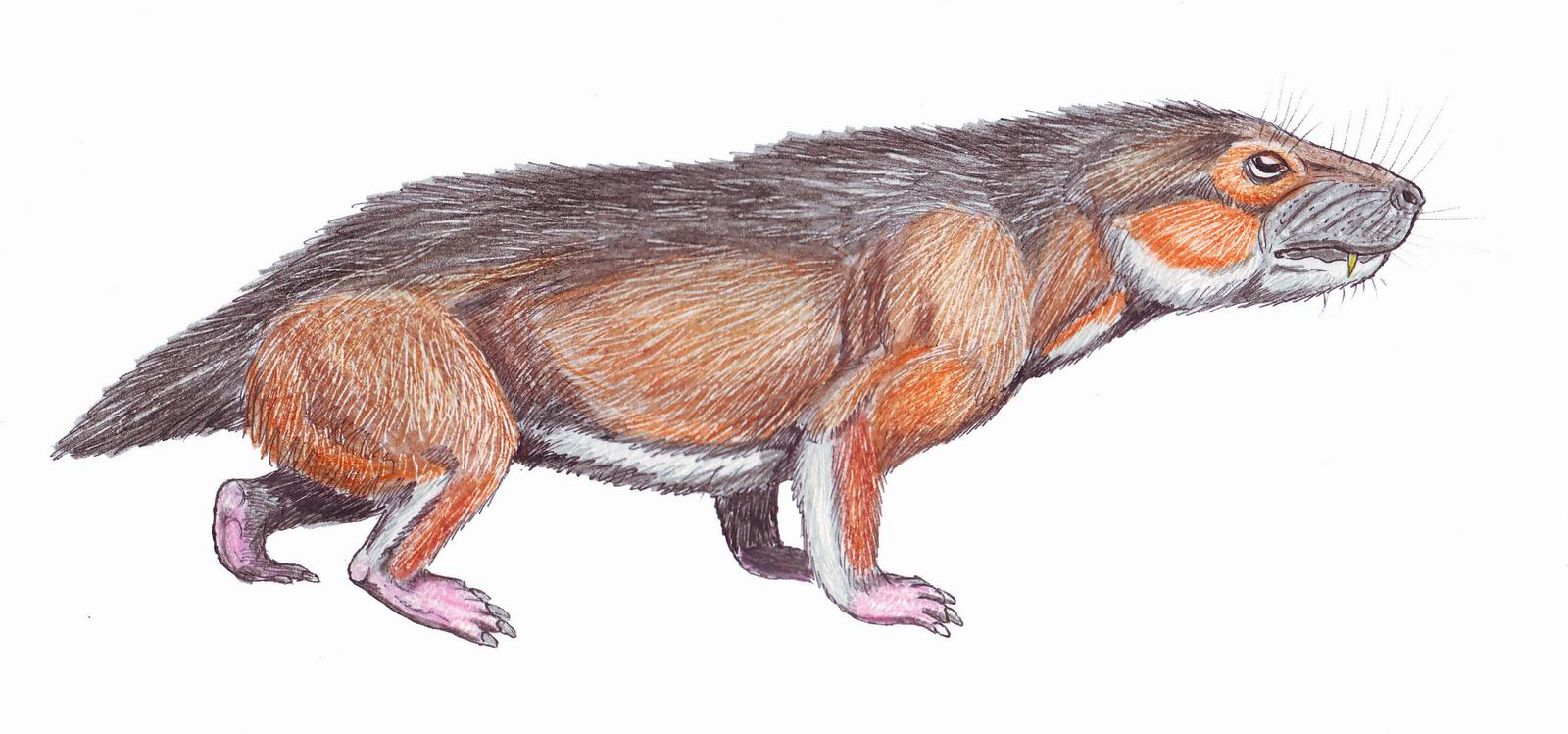 Sesamodon = Bauria